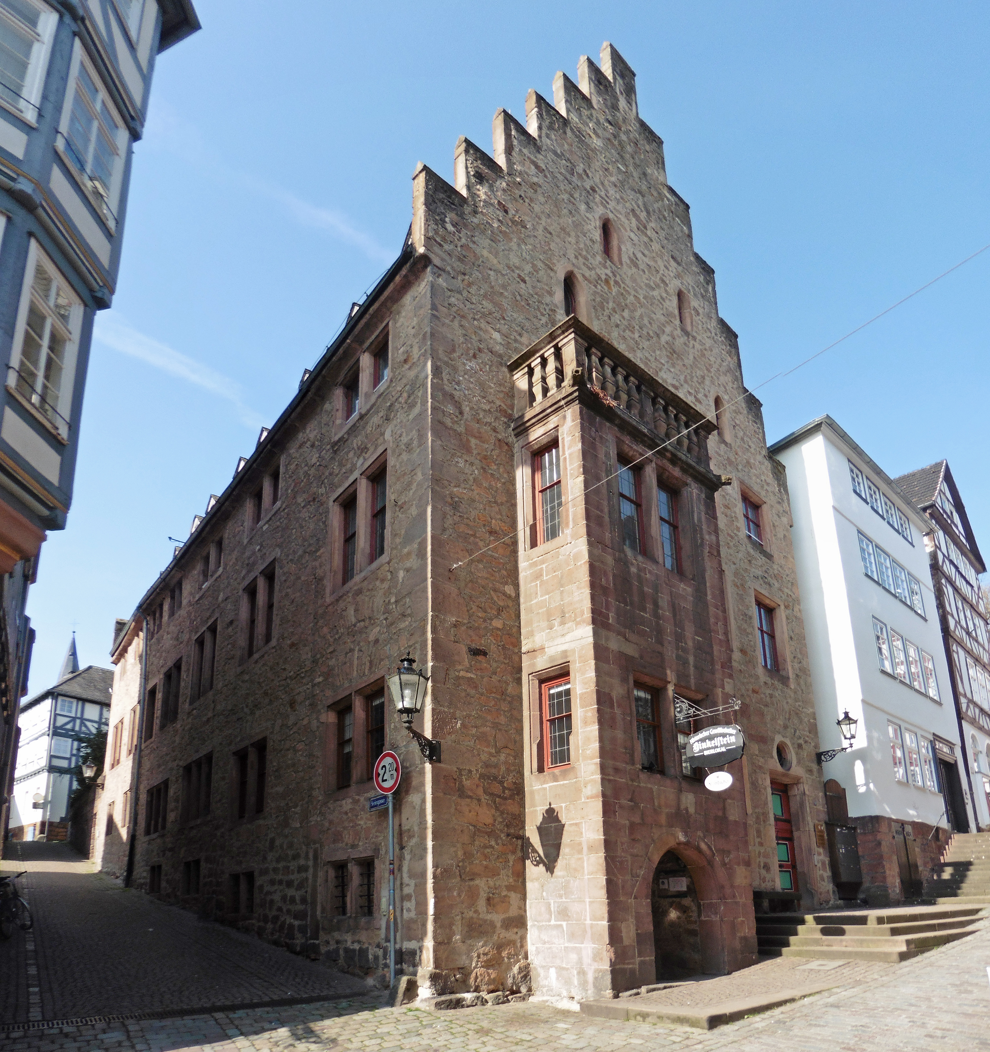 Marburg, Markt 18. "Steinernes Haus", erbaut 1319-1323, ältestes erhaltenes Wohngebäude in Marburg. Ansicht von Osten.